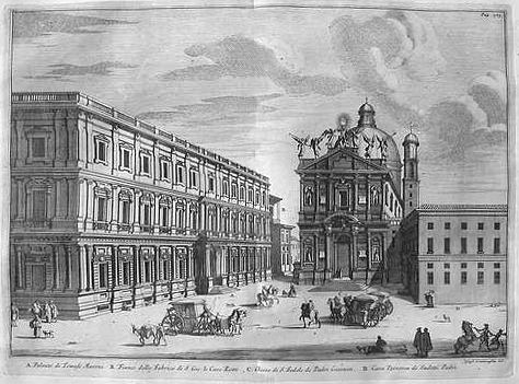 Piazza San Fedele a Milano, nel 1704, in un'incisione di Giovanni Cristostomo Zanchi.